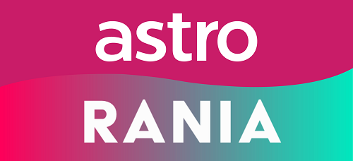 Logo saluran Astro Rania